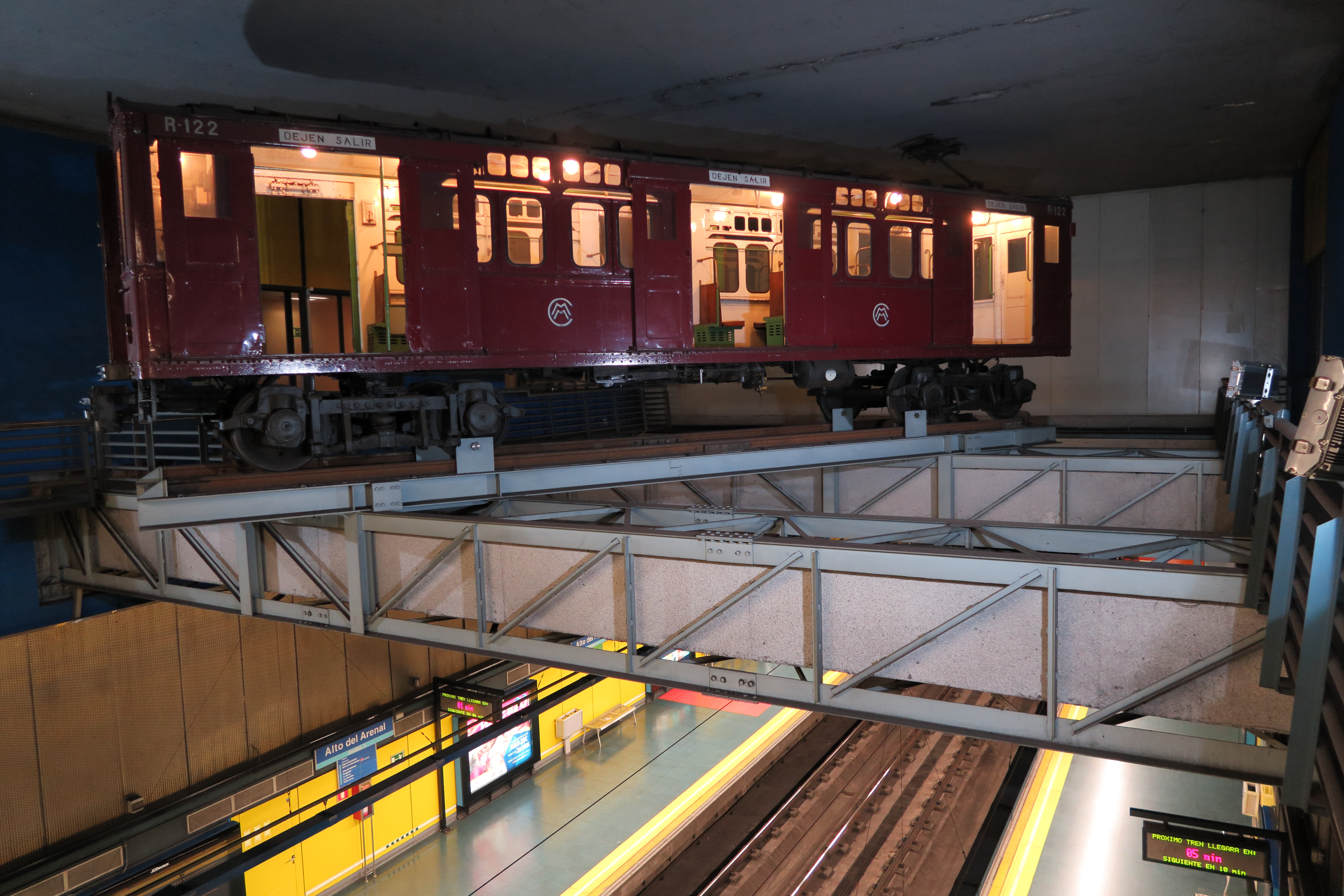 En el vestíbulo de la estación Alto del Arenal se conserva un antiguo vagón de un tren de 1928, perteneciente a la antigua línea 1, que recorrió en total seis millones de kilómetros.